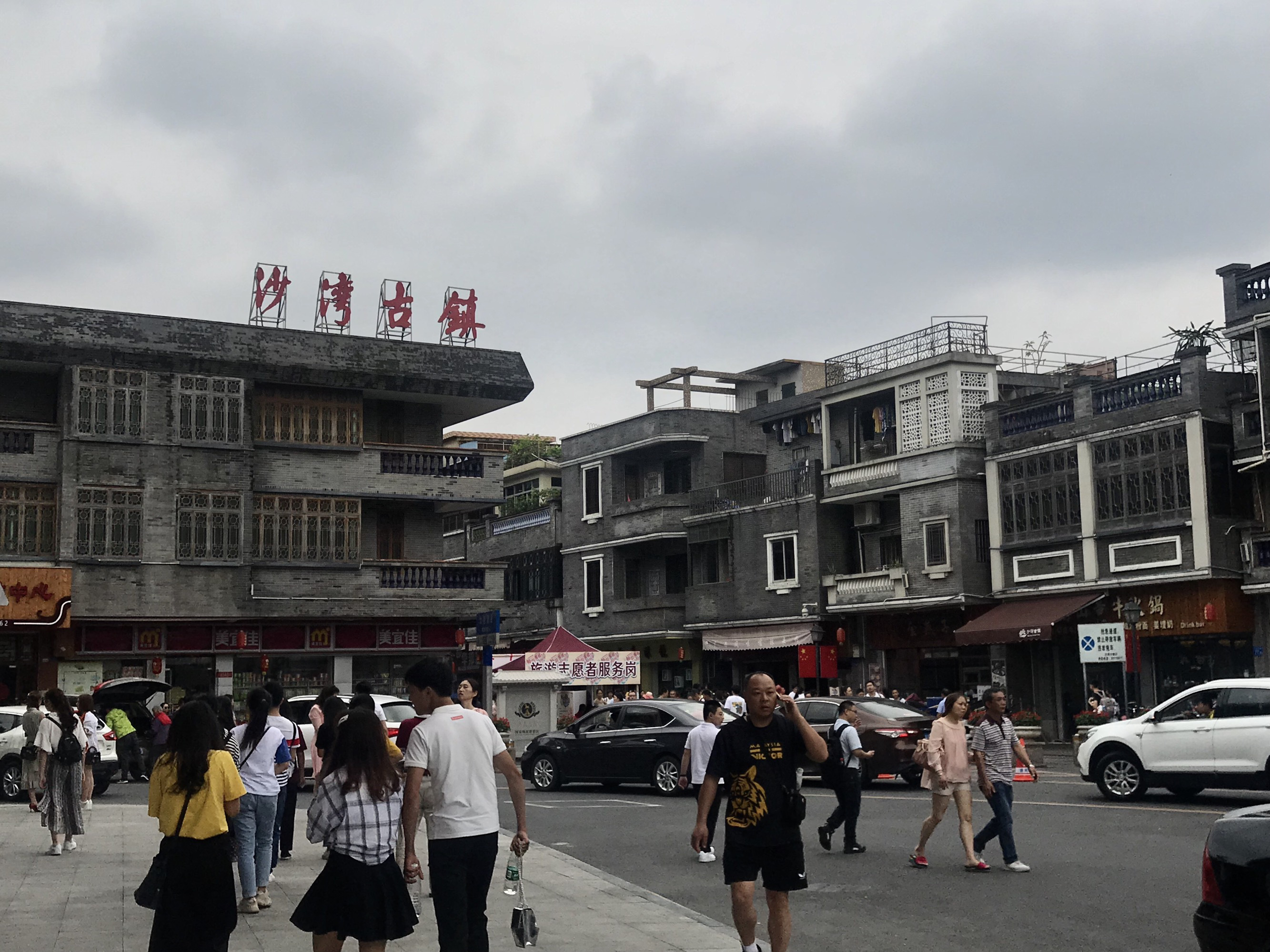 建于宋朝的广州沙湾古镇